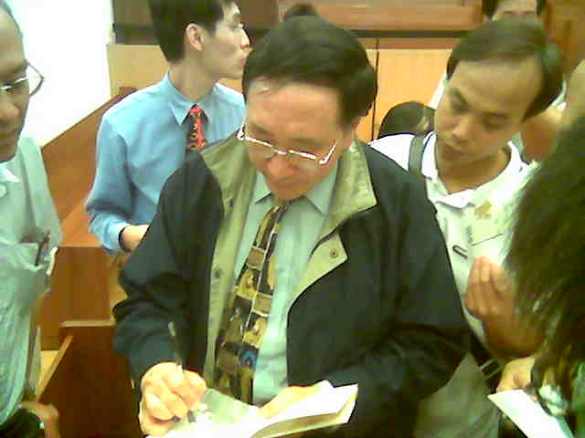 梁燕城近照，攝於宣道會北角堂的佈道會。